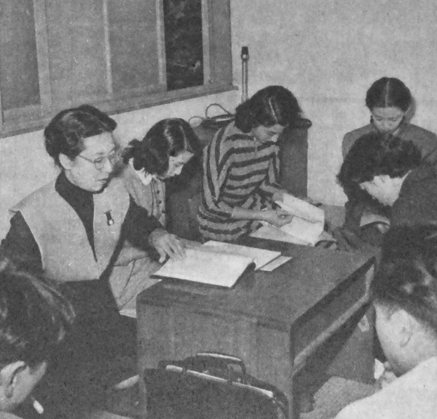 映画『恋文』の台詞合わせ（左から、田中絹代、久我美子、香川京子、関千恵子、花岡菊子）